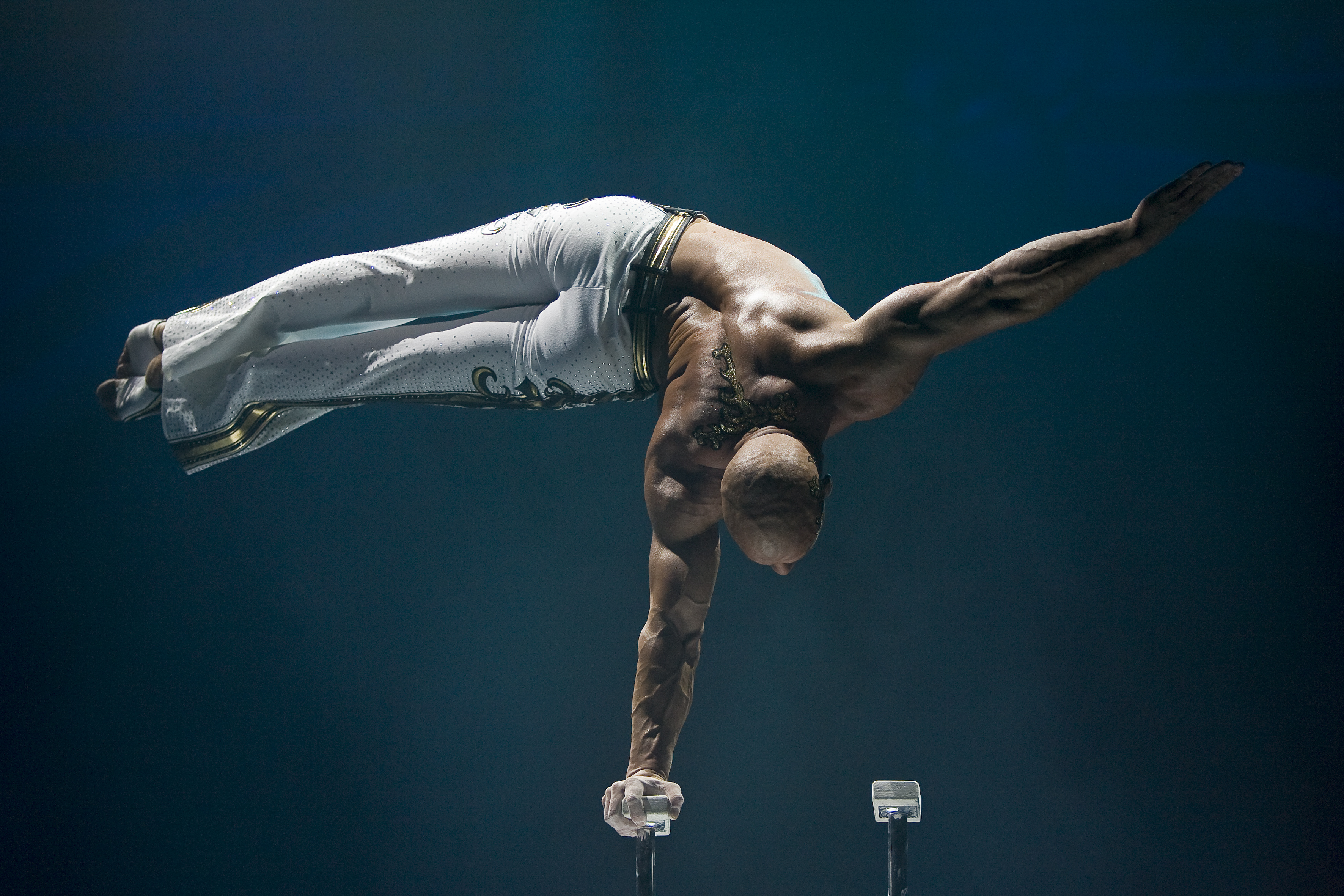 Encho Keryazov bei seiner legendären Handstandnummer